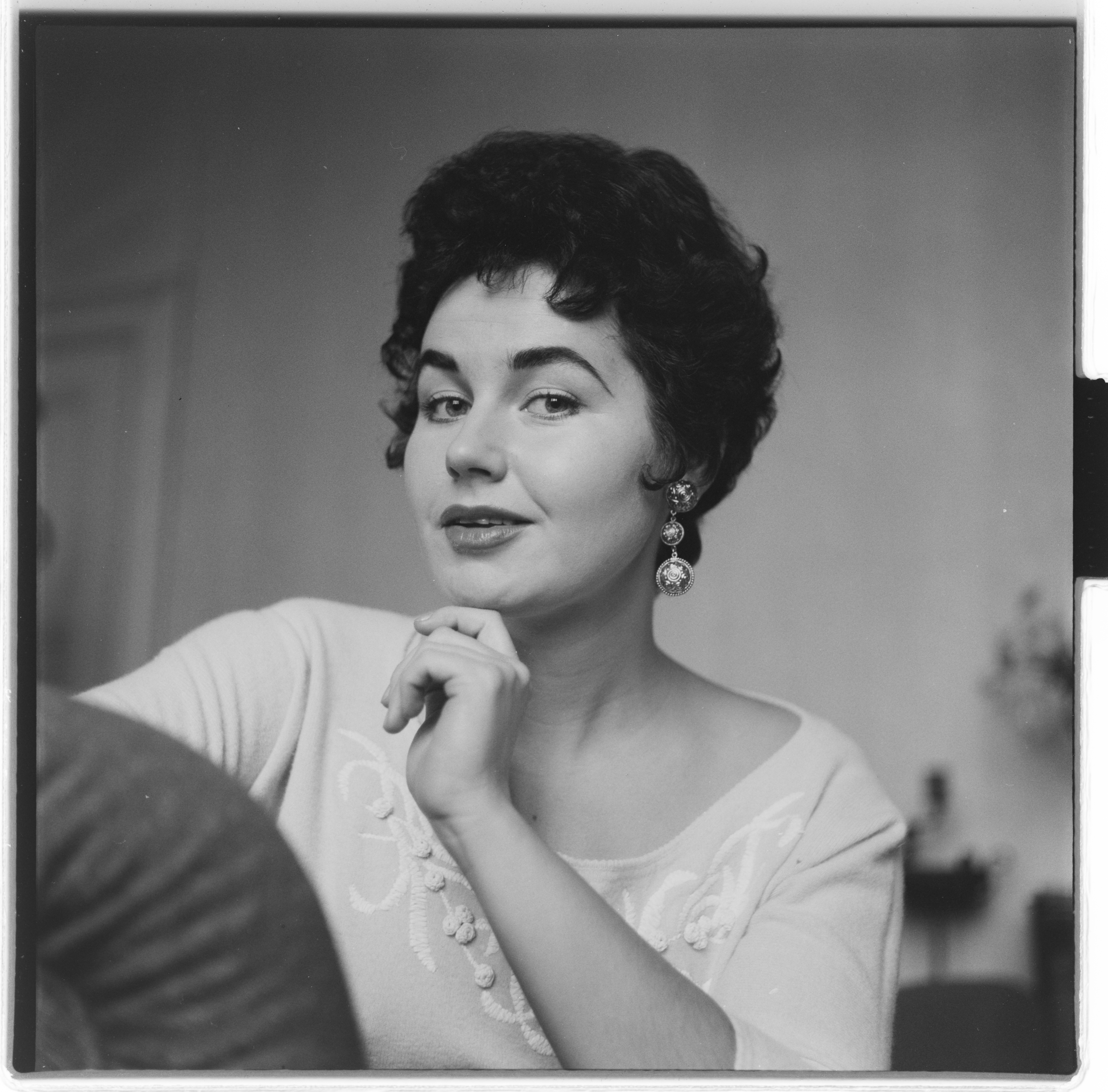 Bildet er hentet fra Arkivverket. Liv Opsahl Arkivinstitusjon : Riksarkivet Arkivnavn : Billedbladet NÅ Sted : Norge, Ukjent, Ukjent, Ukjent Emneord: Kvinner, Portretter Avbildet: Wilse, Liv